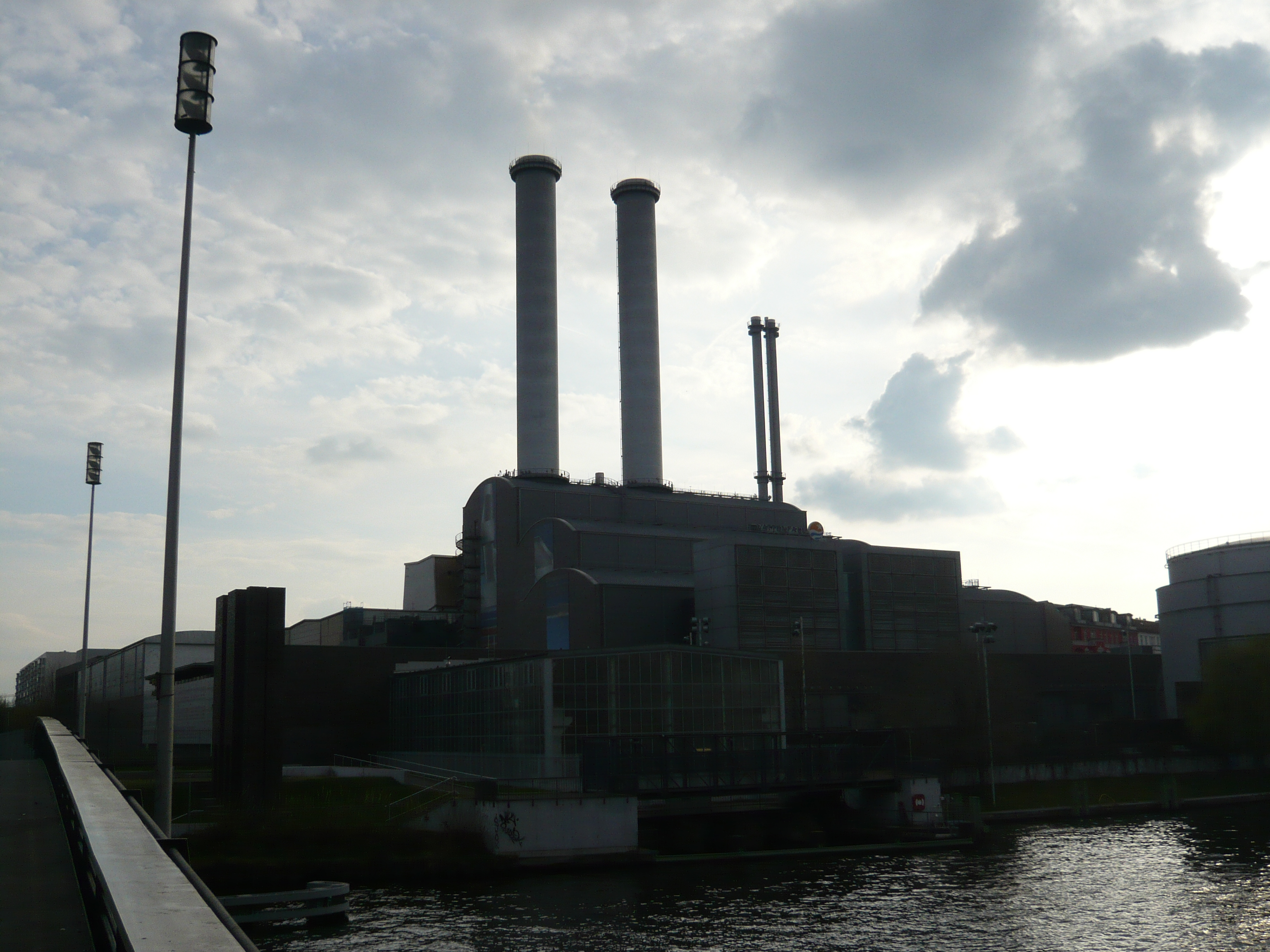 Berlin; Heizkraftwerk an der Michaelbrücke